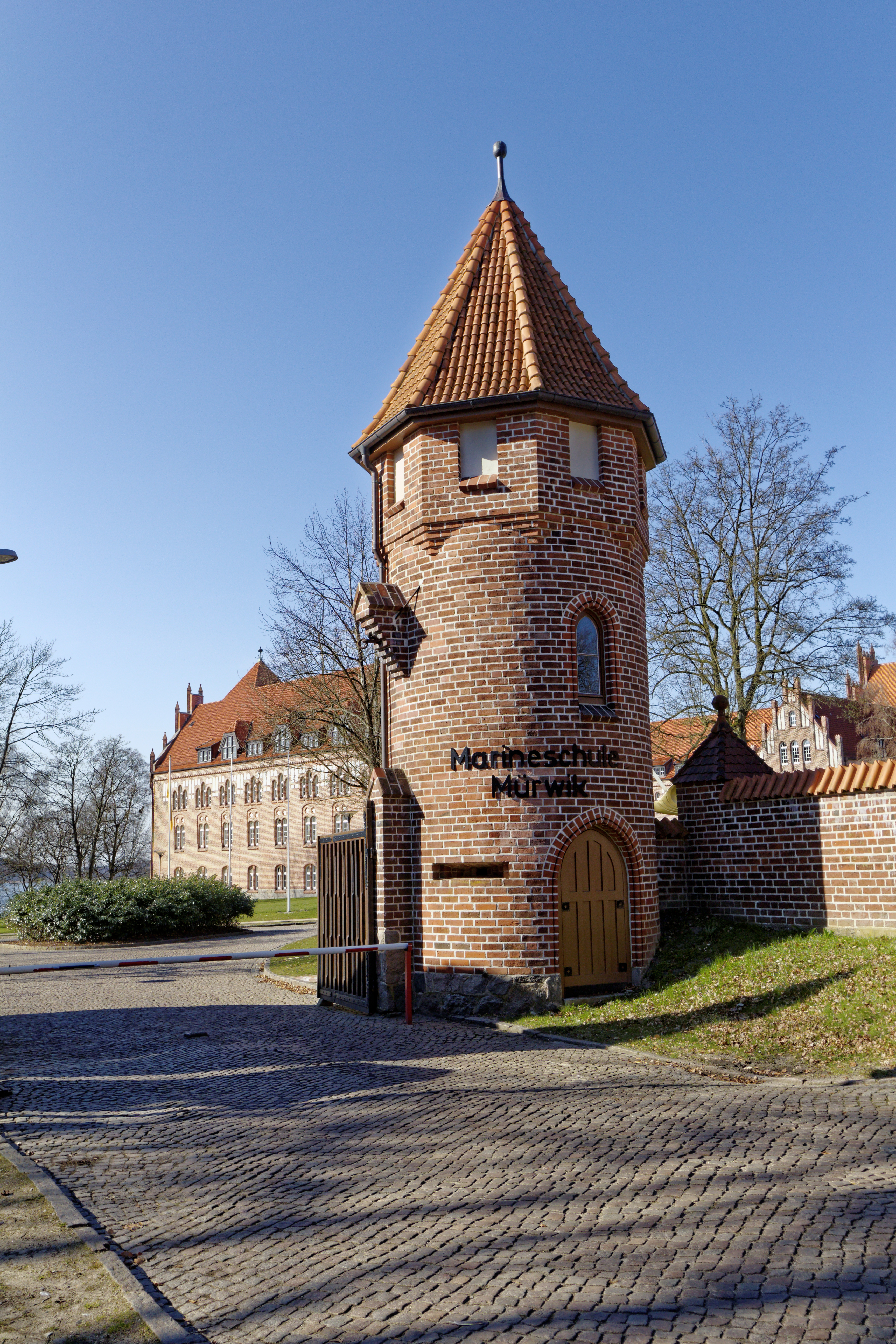 Flensburg, Marineschule Mürwick